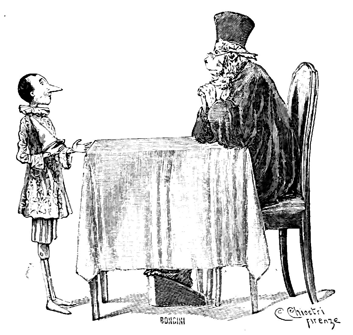 Illustrations from "Le avventure di Pinocchio, storia di un burattino", Carlo Collodi, Bemporad & figlio, Firenze 1902 (Drawings and engravings by Carlo Chiostri, and A. Bongini)